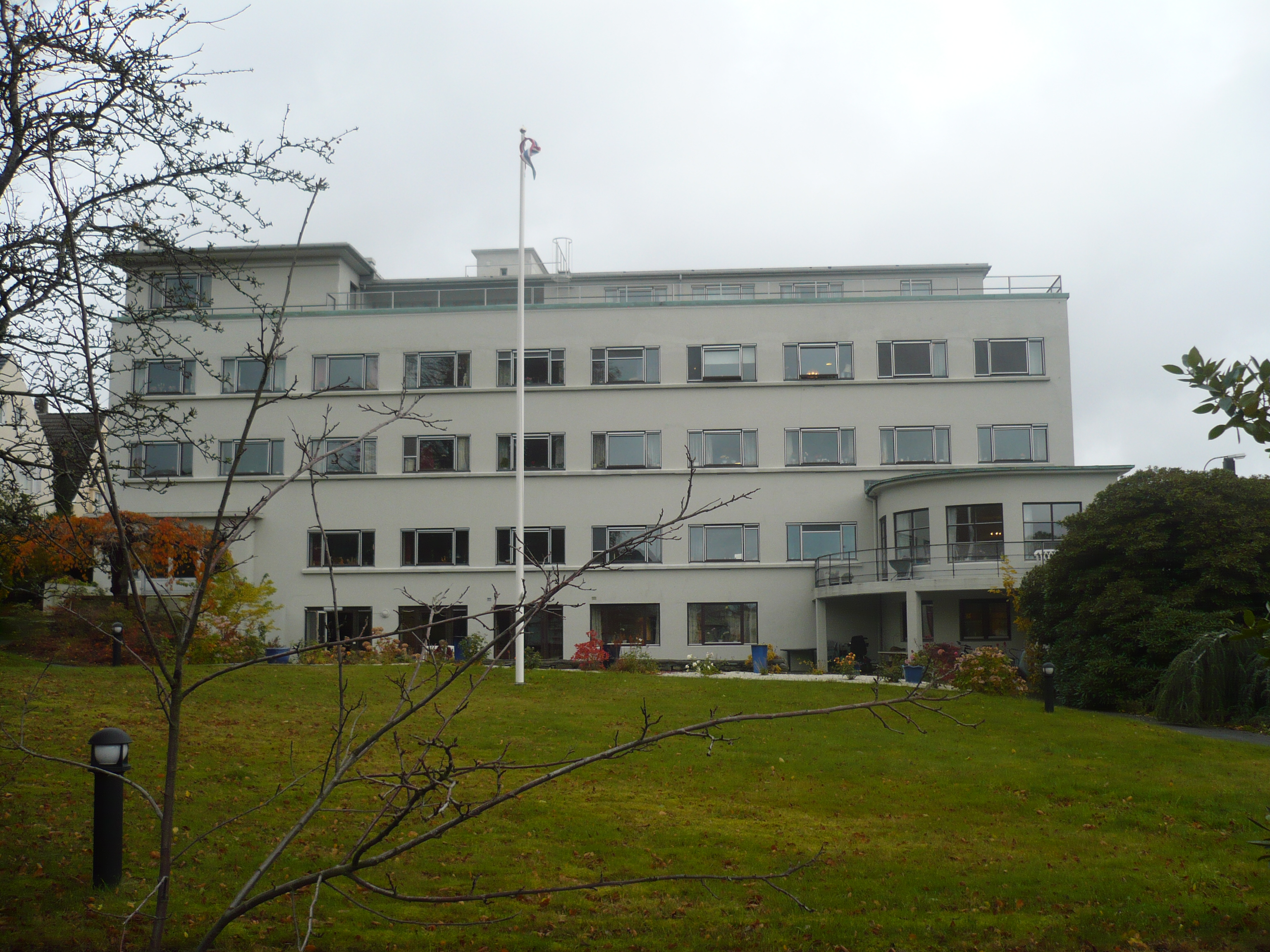 Solvang aldershjem i Stavanger.